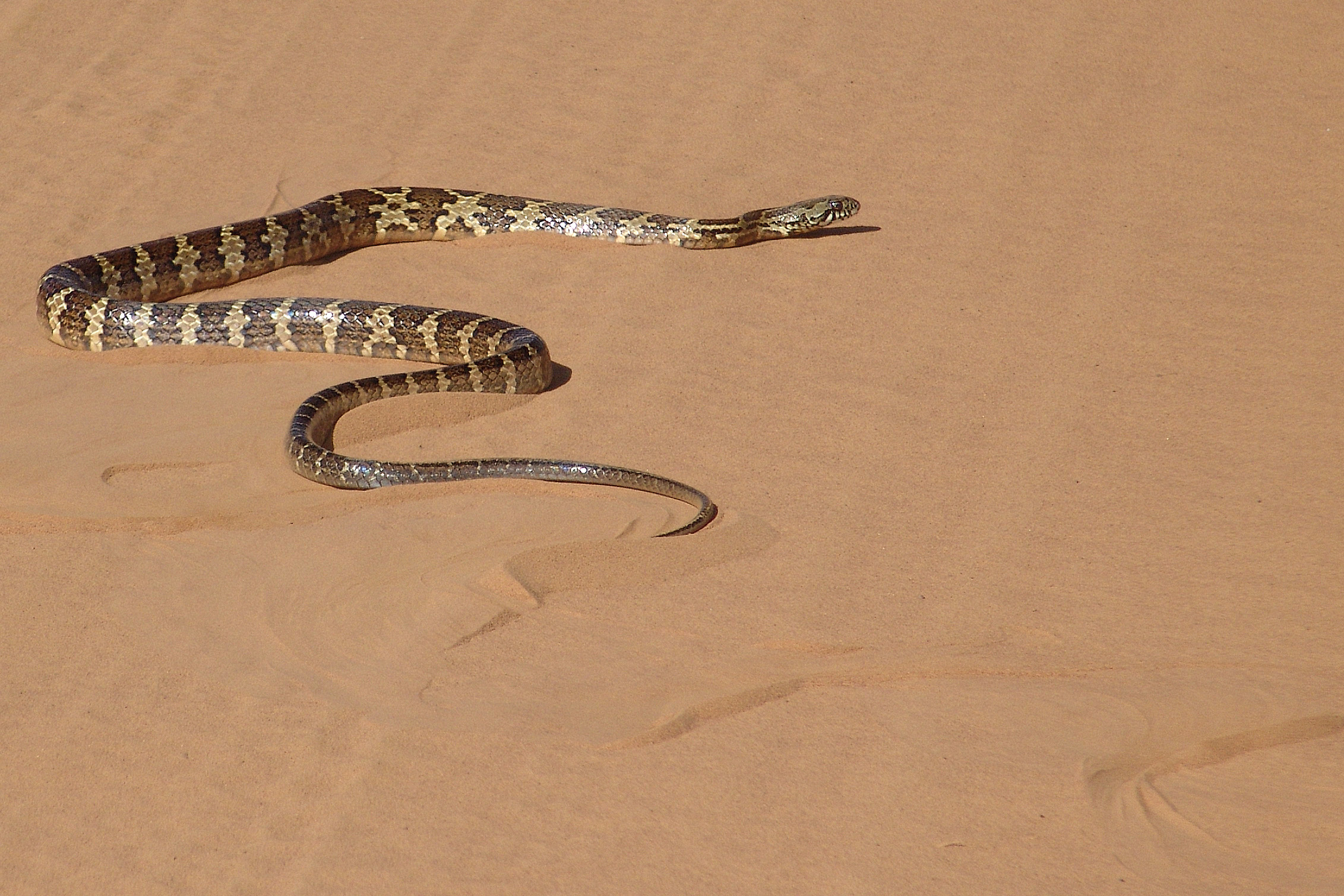 Jararacuçu-do-brejo - (Mastigodryas bifossatus) atravessando estrada de terra a cerca de 6 quilômetros de Avaré, provavelmente com mais ou menos 200 centímetros de comprimento-não tive coragem de medir!!!